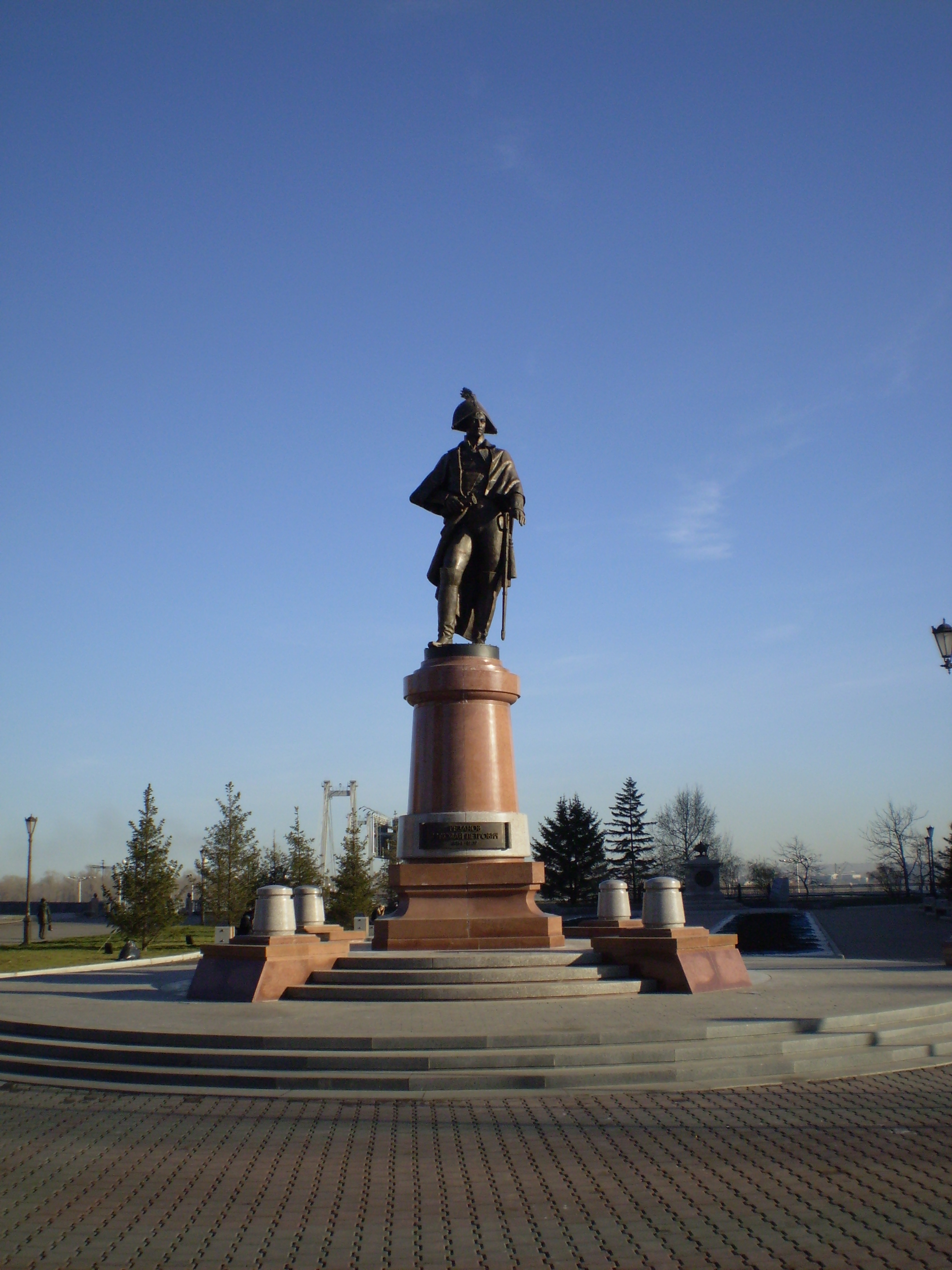 Памятник Резанову